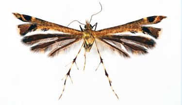 Eucapperia continentalis = Eucapperia bullifera (Meyrick, 1918) (